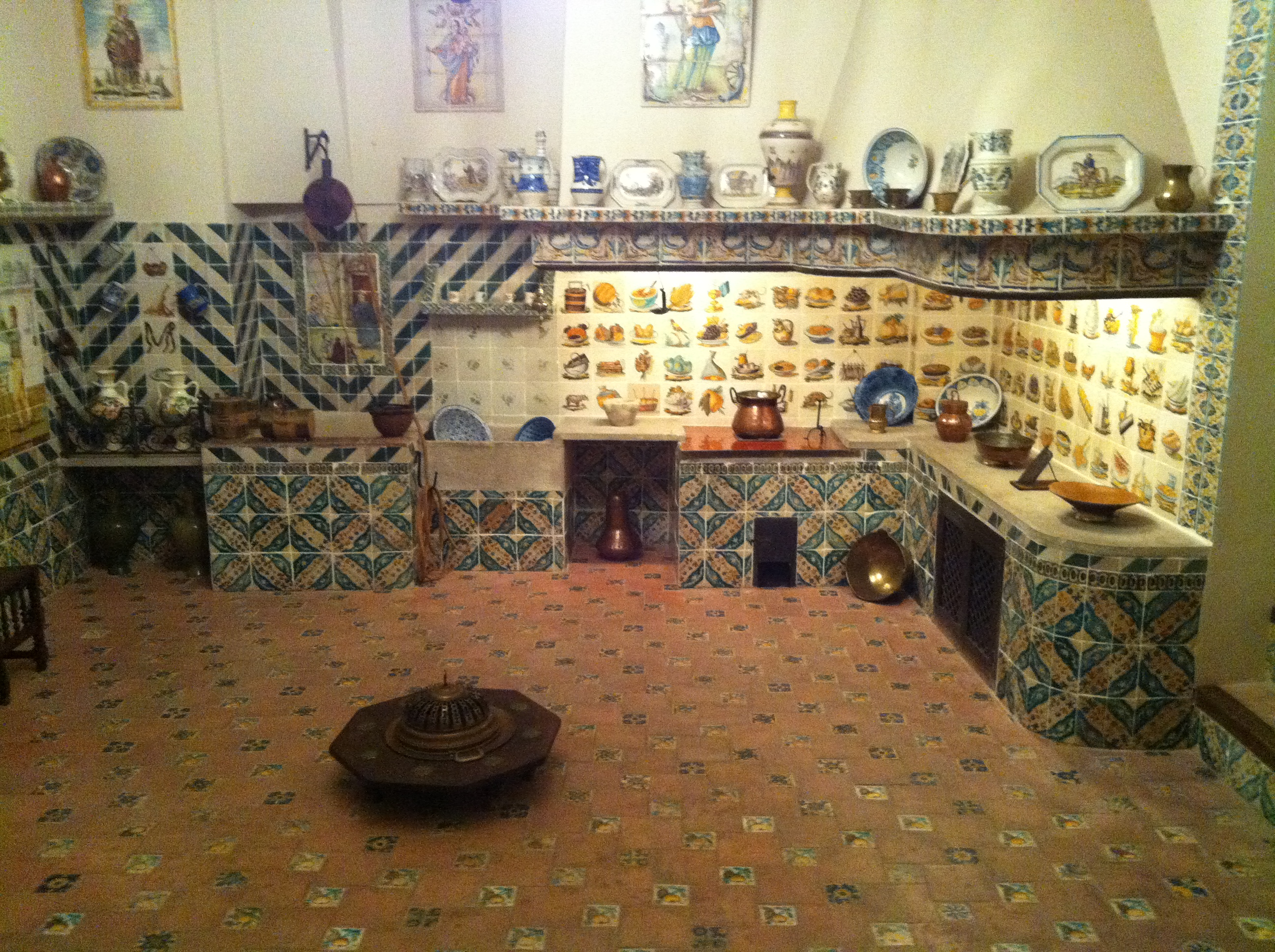 Palau del Marqués de Dosaigües